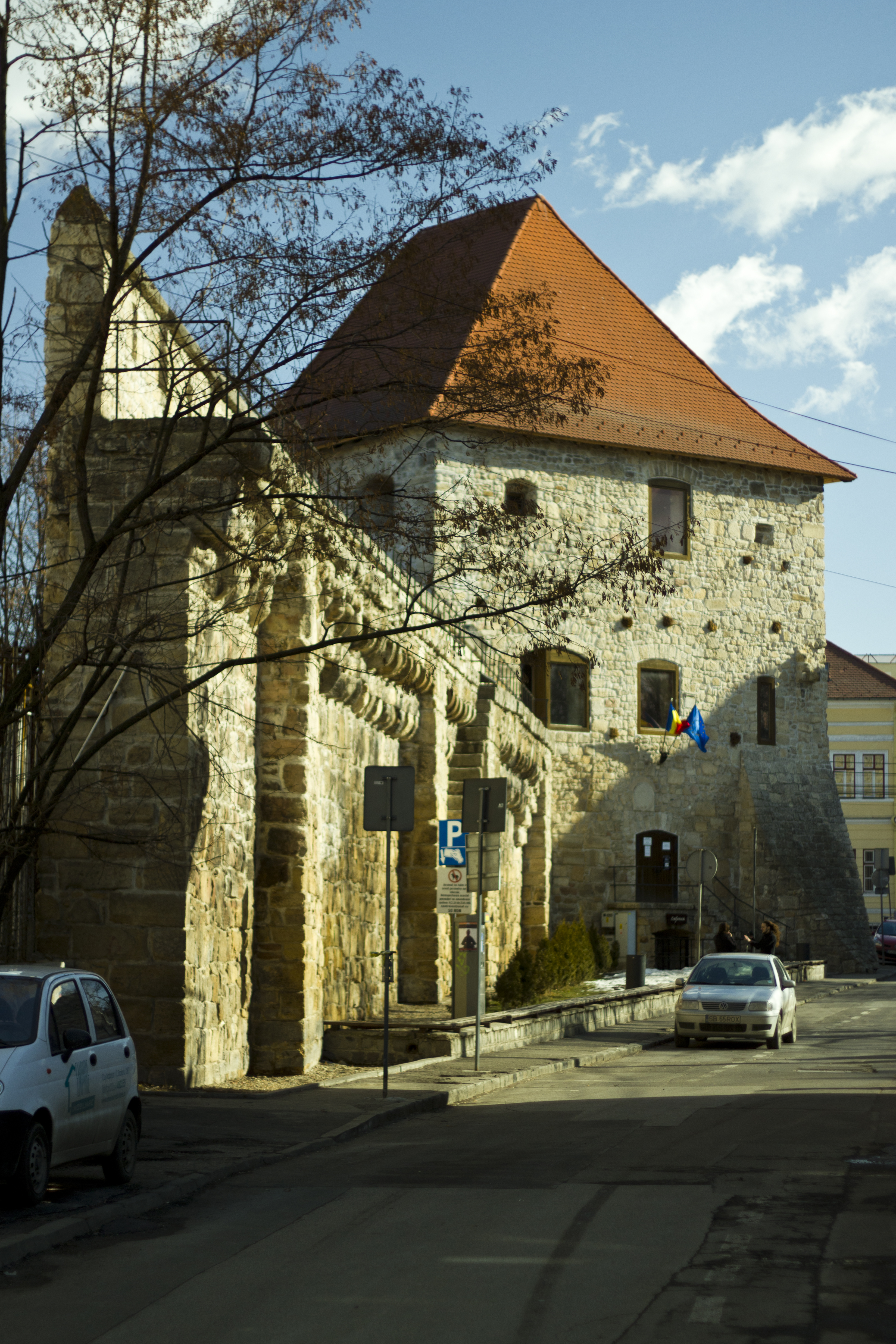 Bastionul Croitorilor este unul din puținele turnuri de fortificație care au făcut parte din Vechea Cetate a Clujului și care s-a păstrat intact până în zilele noastre. A fost finanțat de breasla croitorilor din Cluj. Fiecare bastion al zidului medieval de apărare a fost finanțat de altă breaslă (croitori, cizmari, tâmplari, săpunari, rotari, olari, zidari, curelari).